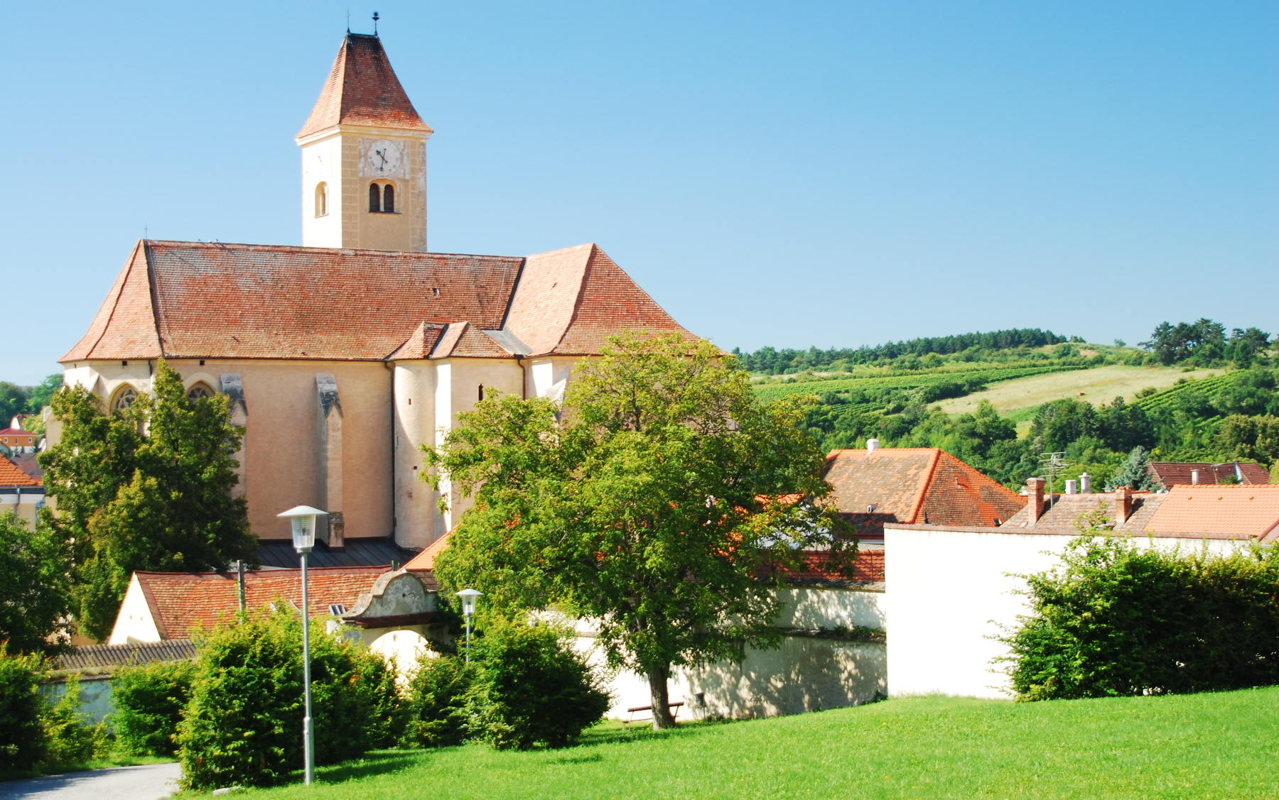 Die Heilig-Blut-Kirche in Pulkau in Niederösterreich